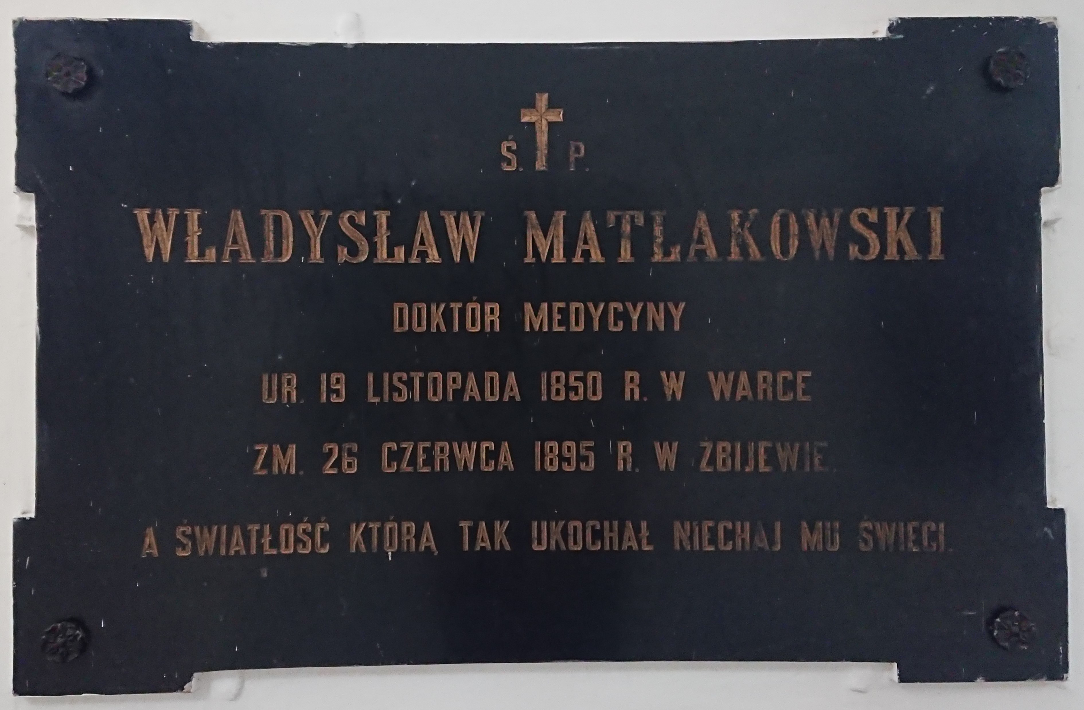 Tablica epitafijna Władysława Matlakowskiego we wnętrzu kościoła Matki Bożej Szkaplerznej w Warce